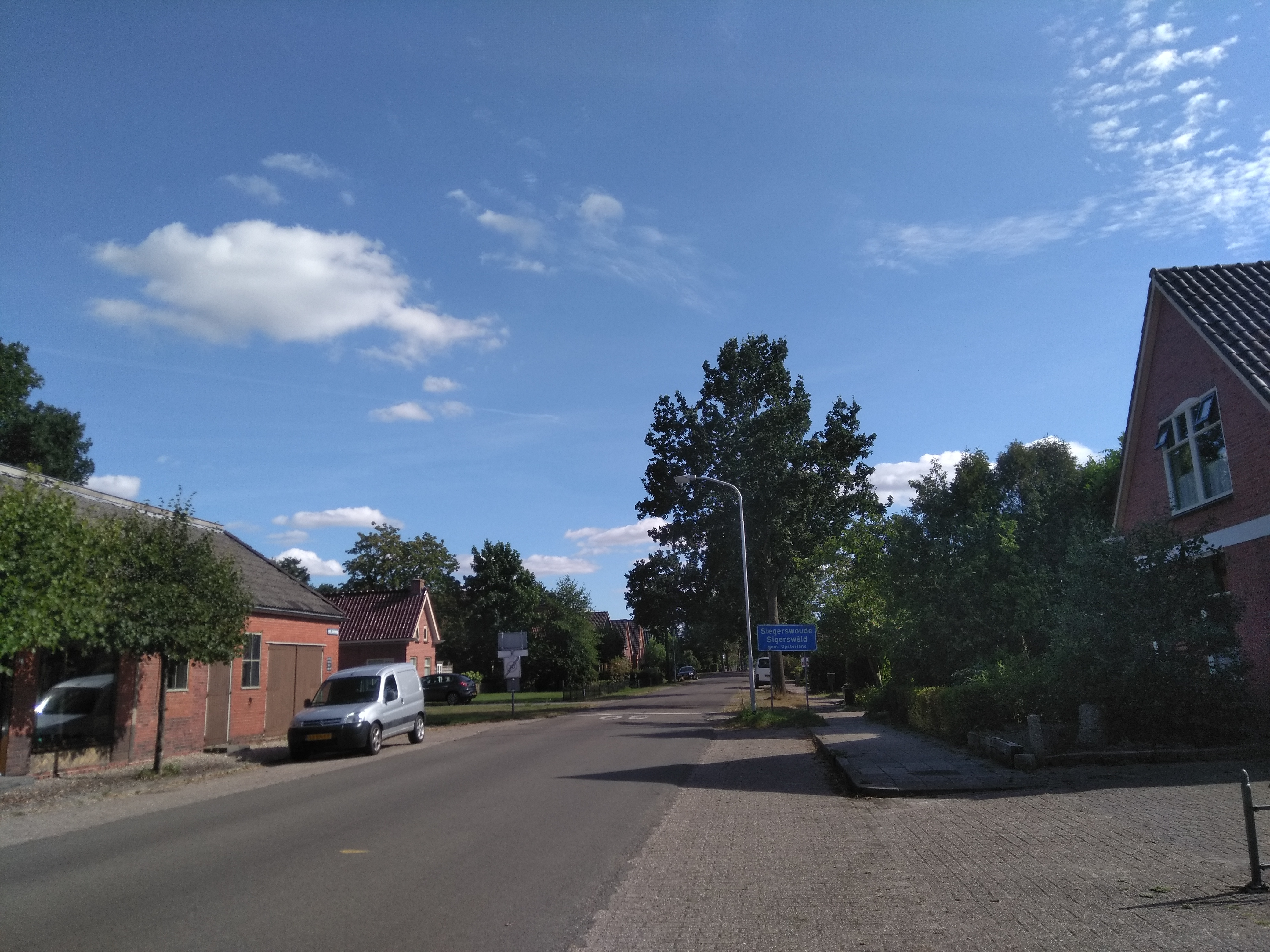 Noordelijk plaatsnaambord van Siegerswoude, gemeente Opsterland, Friesland, bij De Wilp, Groningen.